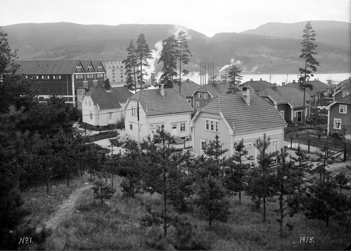 De tre eneboligene i Birkelands gate 15, 17 og 19, lengst øst i Grønnbyen, arbeiderbydel anlagt av Norsk Hydro 1906–1910